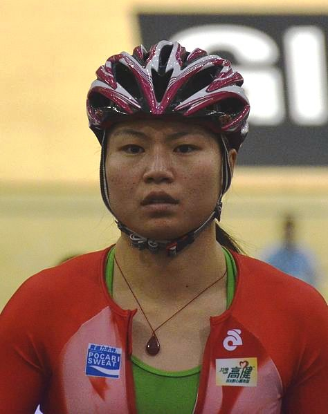 Diao Xiao Juan, Radsportlerin aus Hongkong